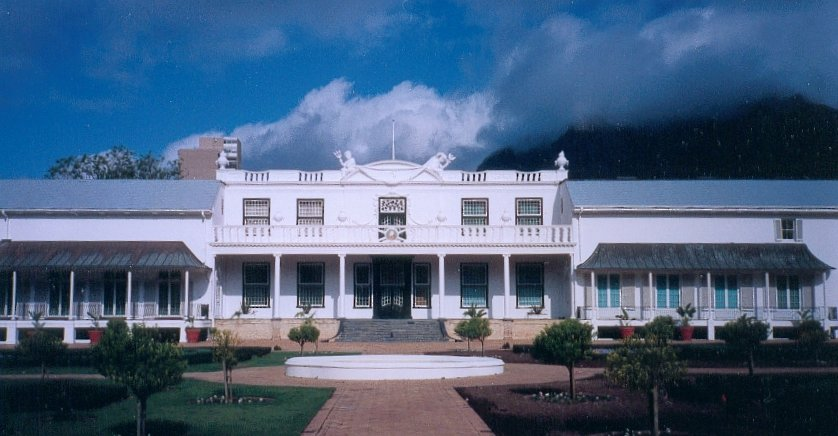 Auteur: FC Georgio Sujet: résidence présidentielle au Cap - Septembre 1991 Reproduction et utilisation interdites sauf accord de l'auteur